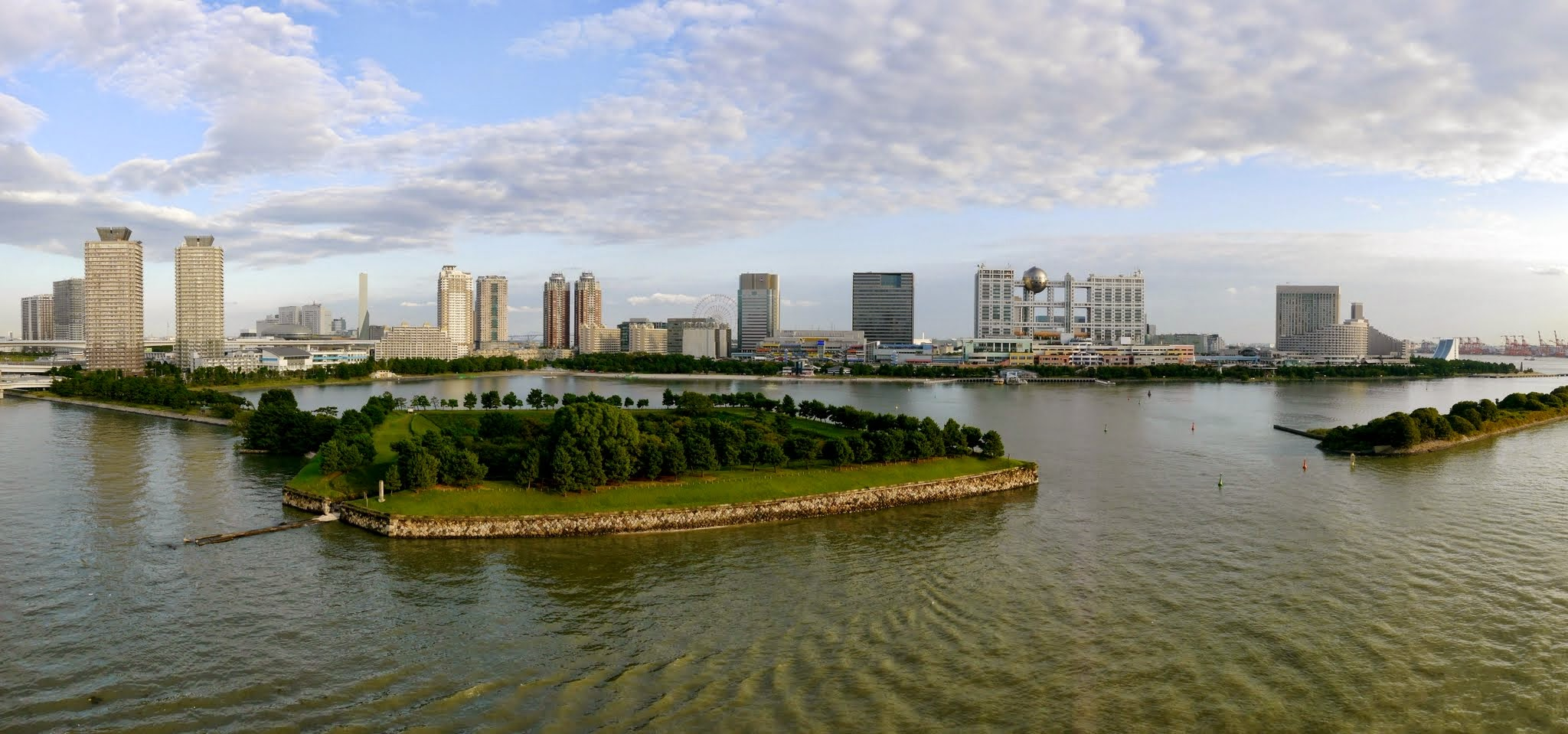 Panorama von Odaiba in Tokio mit dem Fuji TV Hauptquartier This work by Ronny Siegel is licensed under a Creative Commons Attribution 4.0 International License. - You can freely use this work, any way you want including altering and/or selling if you call my name on your publication. You can find this picture also on my website